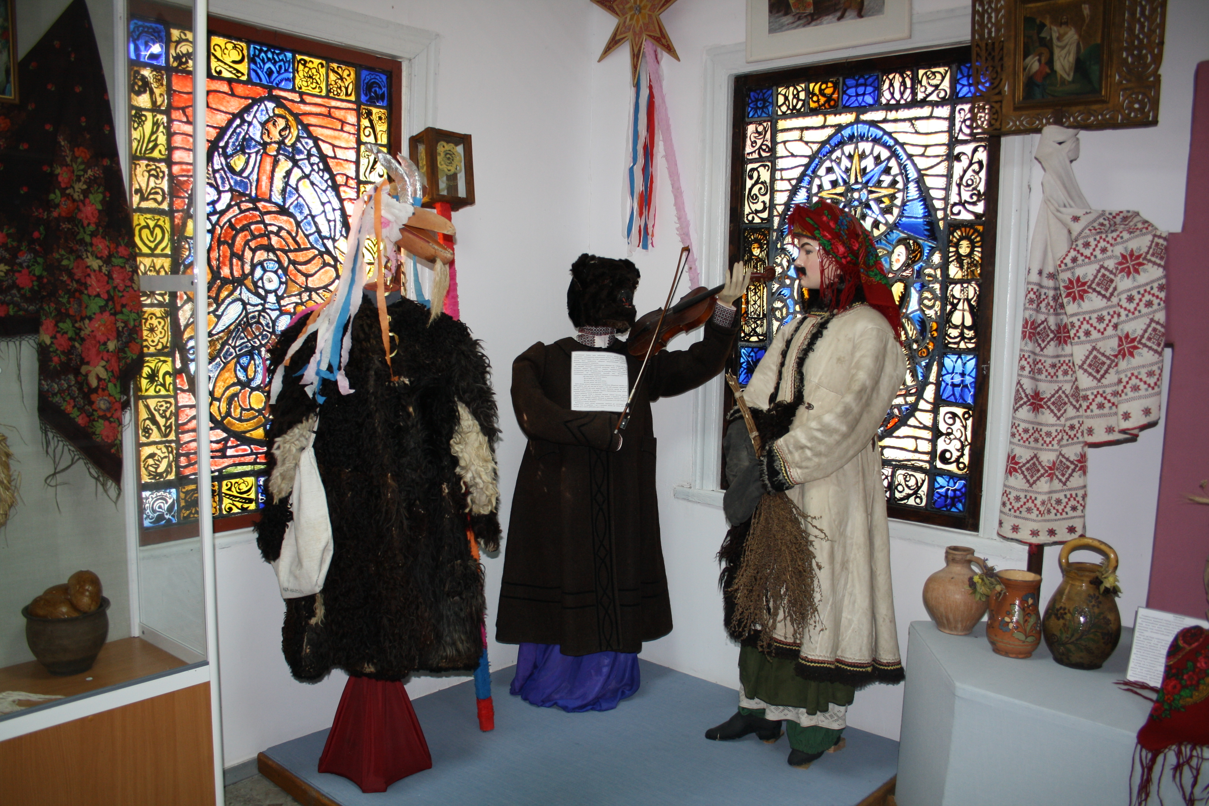 2. Фото 2. Календарна обрядовість. Щедрувальники., Музей українських обрядів